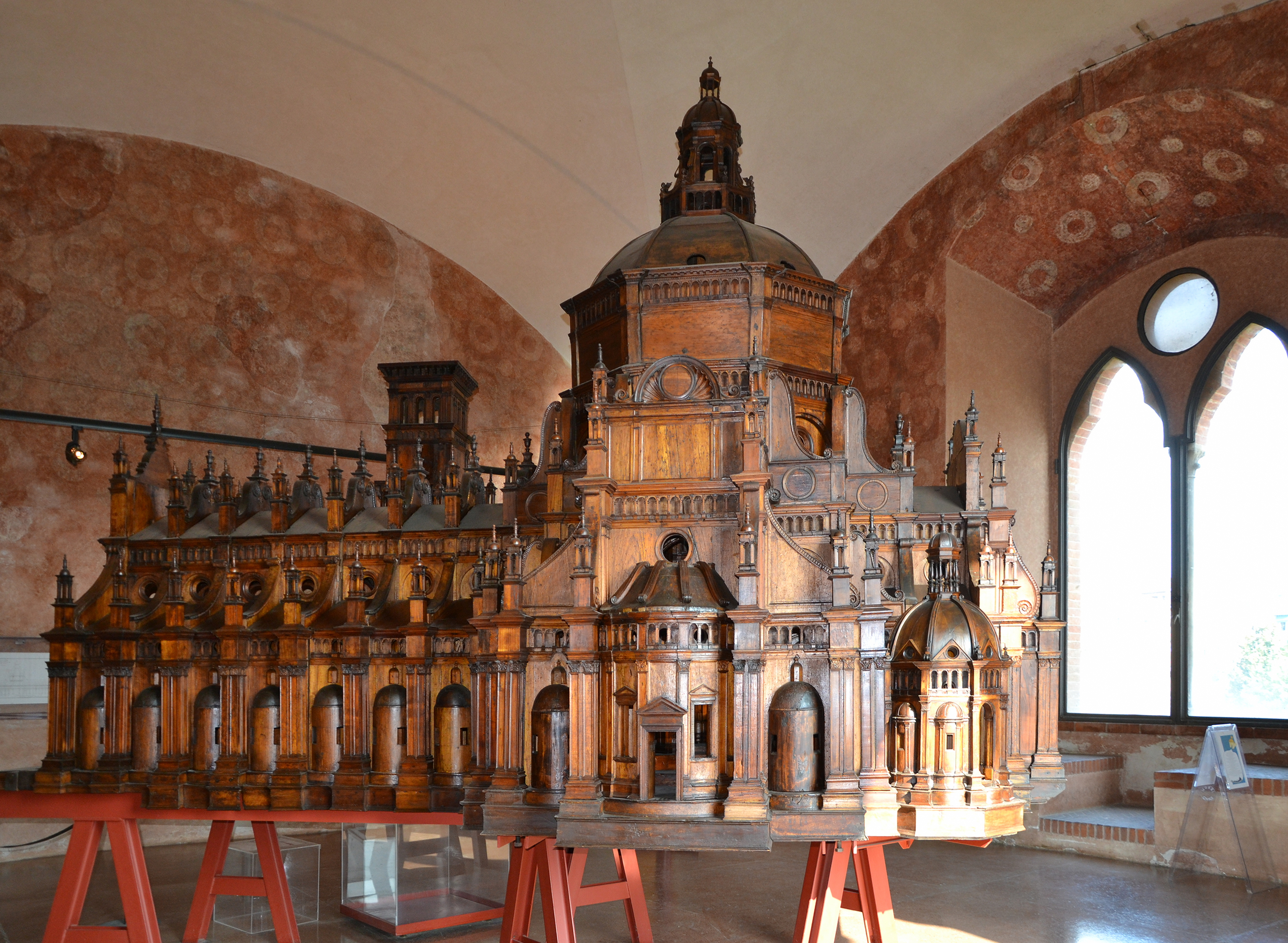 modello del duomo di Pavia intagliato in legno di cipresso, rovere e noce attribuito a Gian Pietro Fugazza a partire dal 1497, sulla base del progetto per la cattedrale di Pavia ideato da Giovanni Antonio Amadeo e Gian Giacomo Dolcebuono. Realizzazione dell'intagliatore Cristoforo Rocchi († 1497)